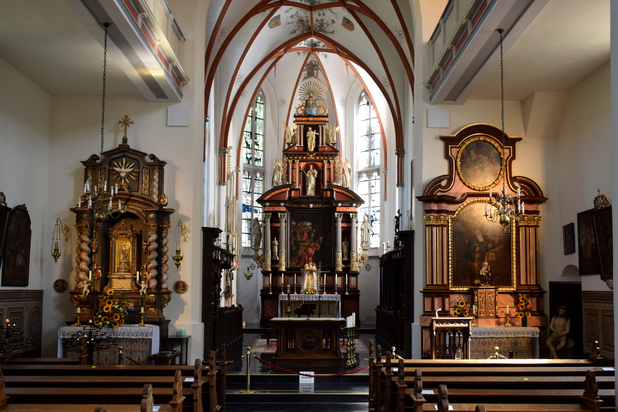 Marije-Himelfearttsjerke, Marienbaum (Xanten), oersjoch ynterieur